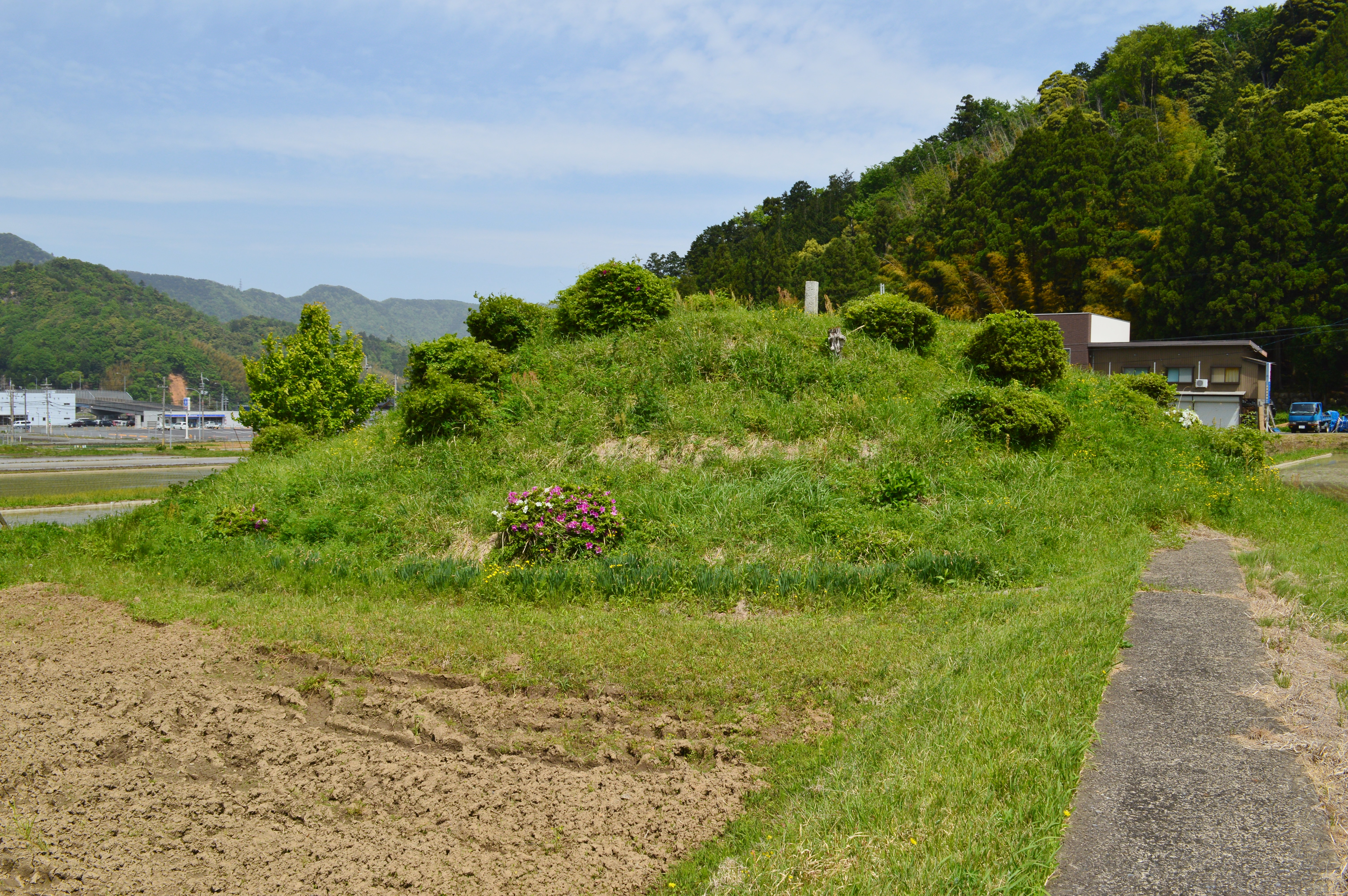 西塚古墳 (若狭町) 後円部墳丘